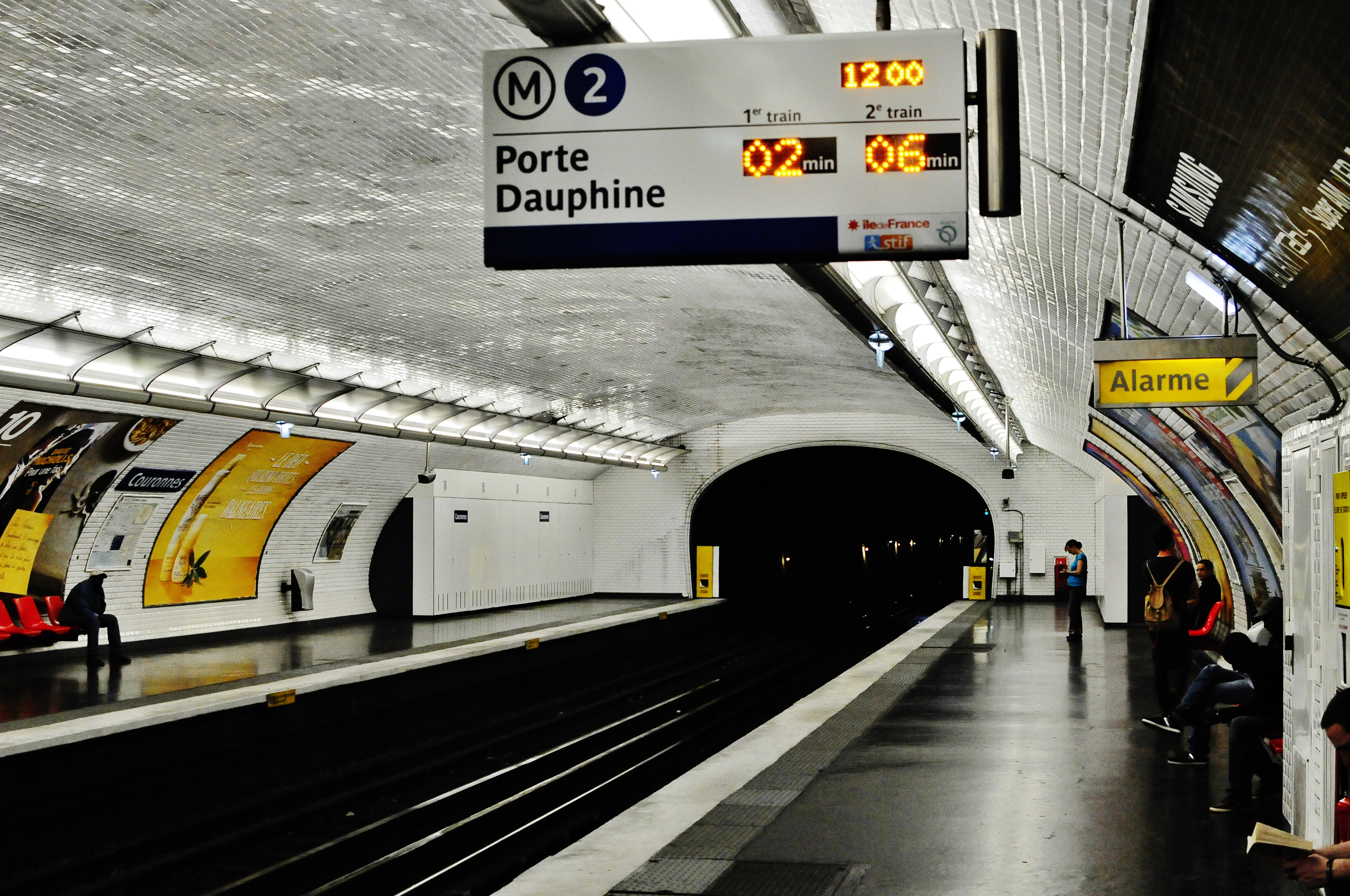 Couronnes (Paris Metro)